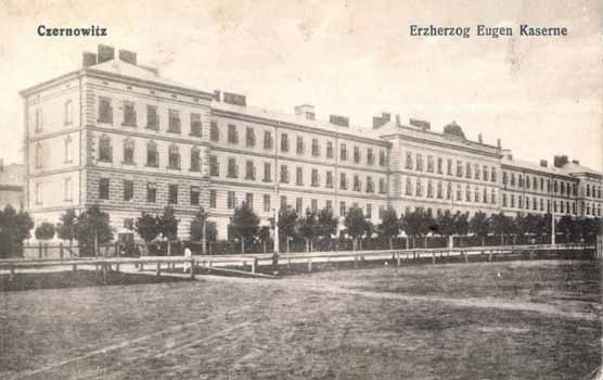 Erzherzog Eugen Kaserne in Czernowitz